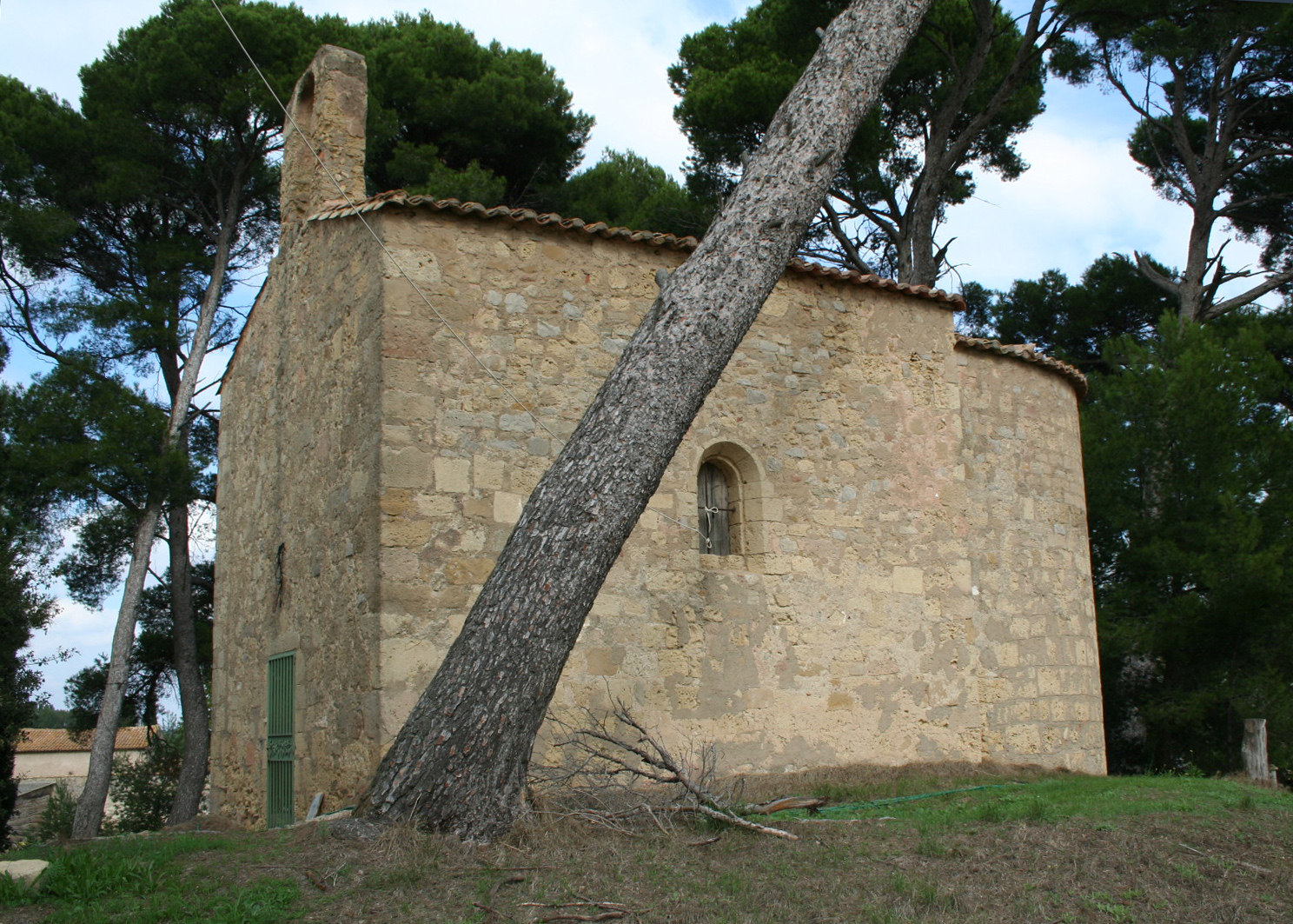 Mèze (Hérault) - Saint-Martin de Caux - église romane.